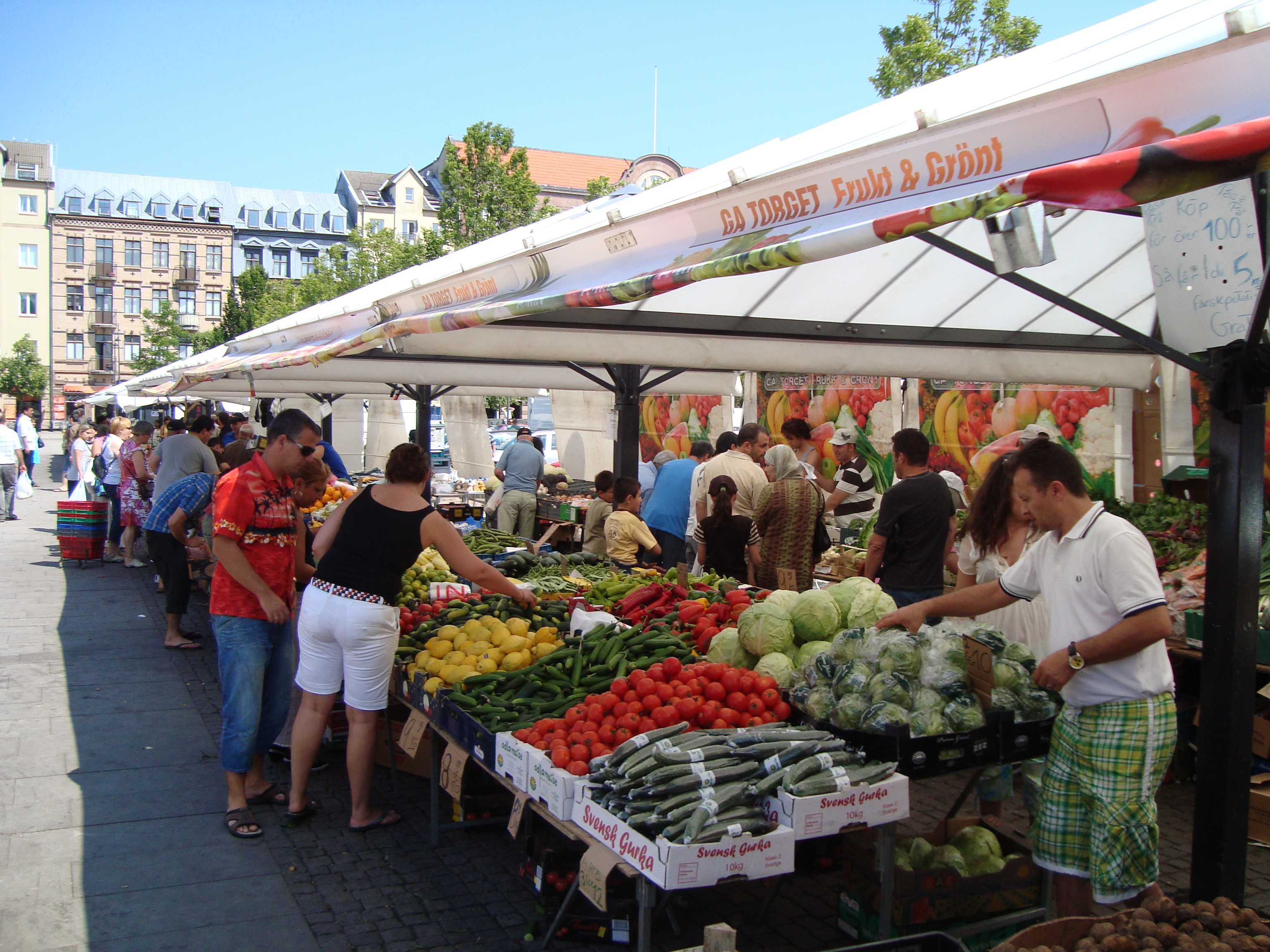 Grönsaksstånd på Gustav Adolfs torg i Helsingborg.